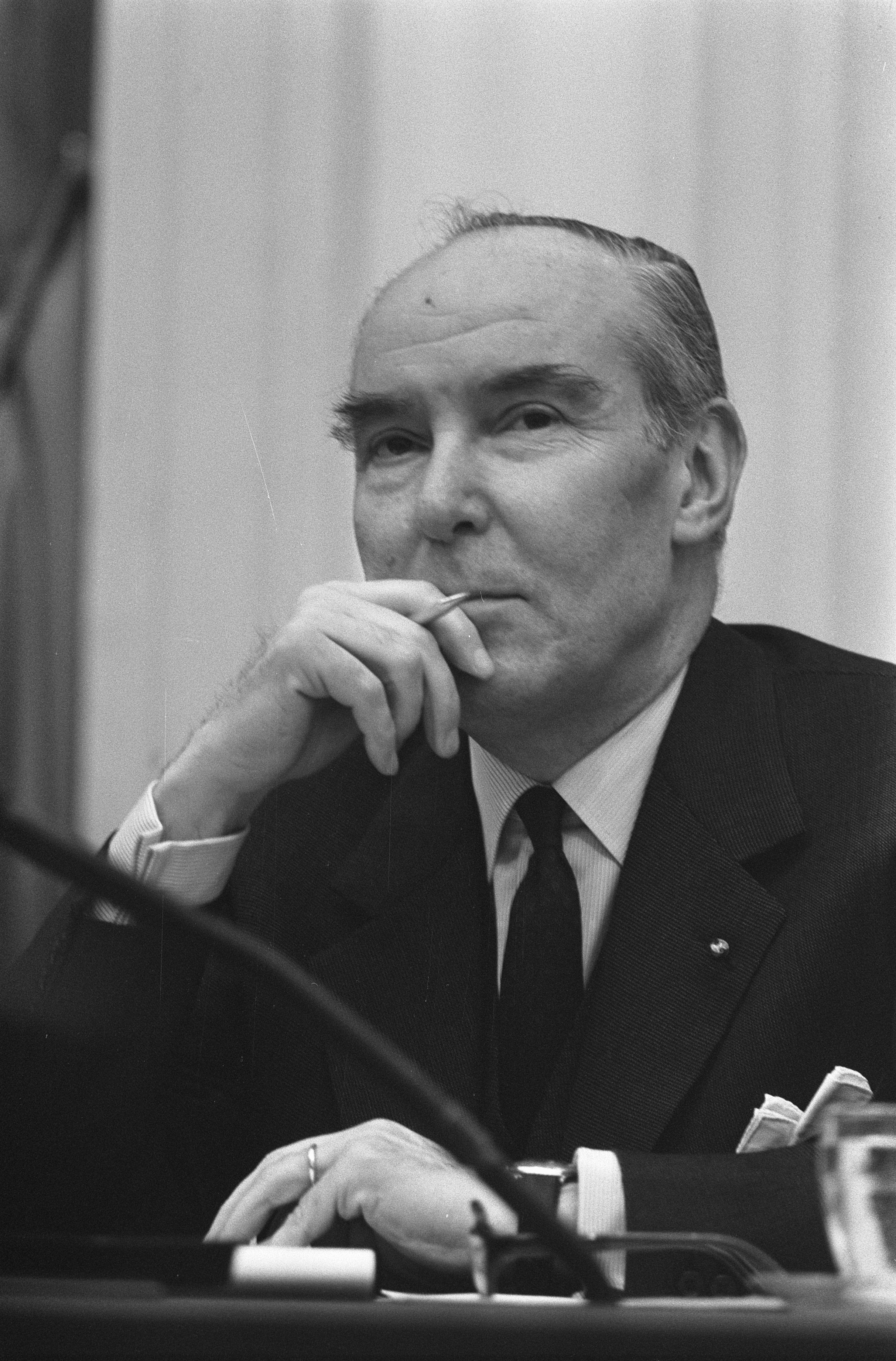 Collectie / Archief : Fotocollectie Anefo Reportage / Serie : [ onbekend ] Beschrijving : Tweede Kamer behandelt begroting volksgezondheid, Minister Stuyt Datum : 14 februari 1973 Locatie : Den Haag, Zuid-Holland Trefwoorden : gezondheidszorg, ministers, overheidsbegrotingen, parlementaire debatten, politiek, portretten Persoonsnaam : Stuyt, L.B.J. Fotograaf : Mieremet, Rob / Anefo Auteursrechthebbende : Nationaal Archief Materiaalsoort : Negatief (zwart/wit) Nummer archiefinventaris : bekijk toegang 2.24.01.05 Bestanddeelnummer : 926-2220